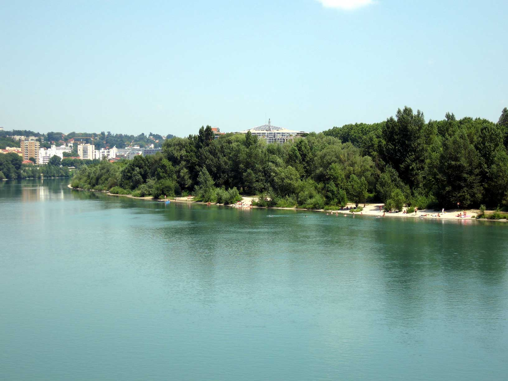 Le Rhône à Lyon et les abords du parc de Tête d'Or (photo prise du pont Winston Churchill), Lyon, France